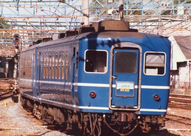 12系お座敷列車「旅路」初期の改装前(熊本駅にて撮影)